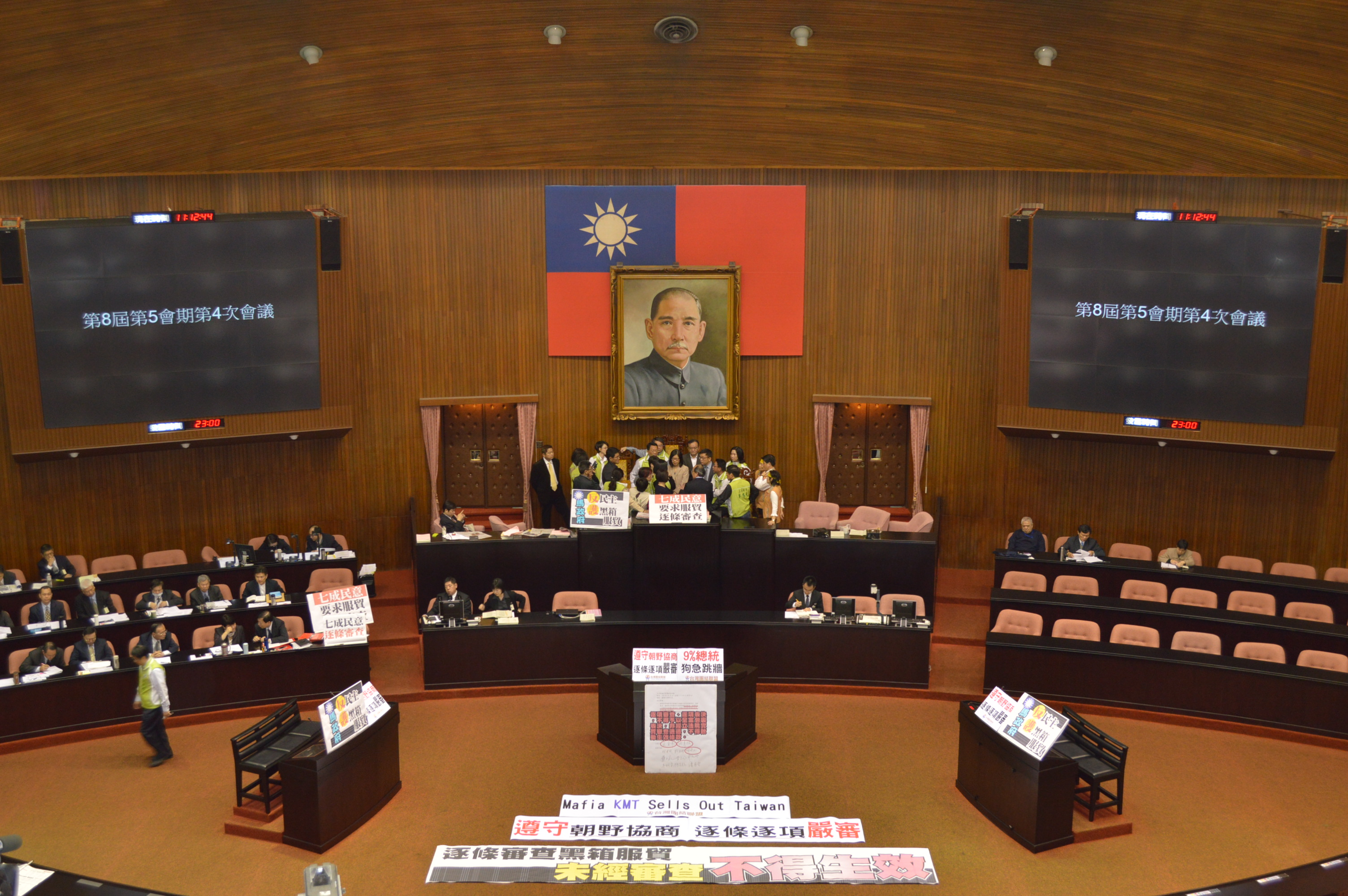 3月18日民進黨立委佔領立法院議會主席臺。